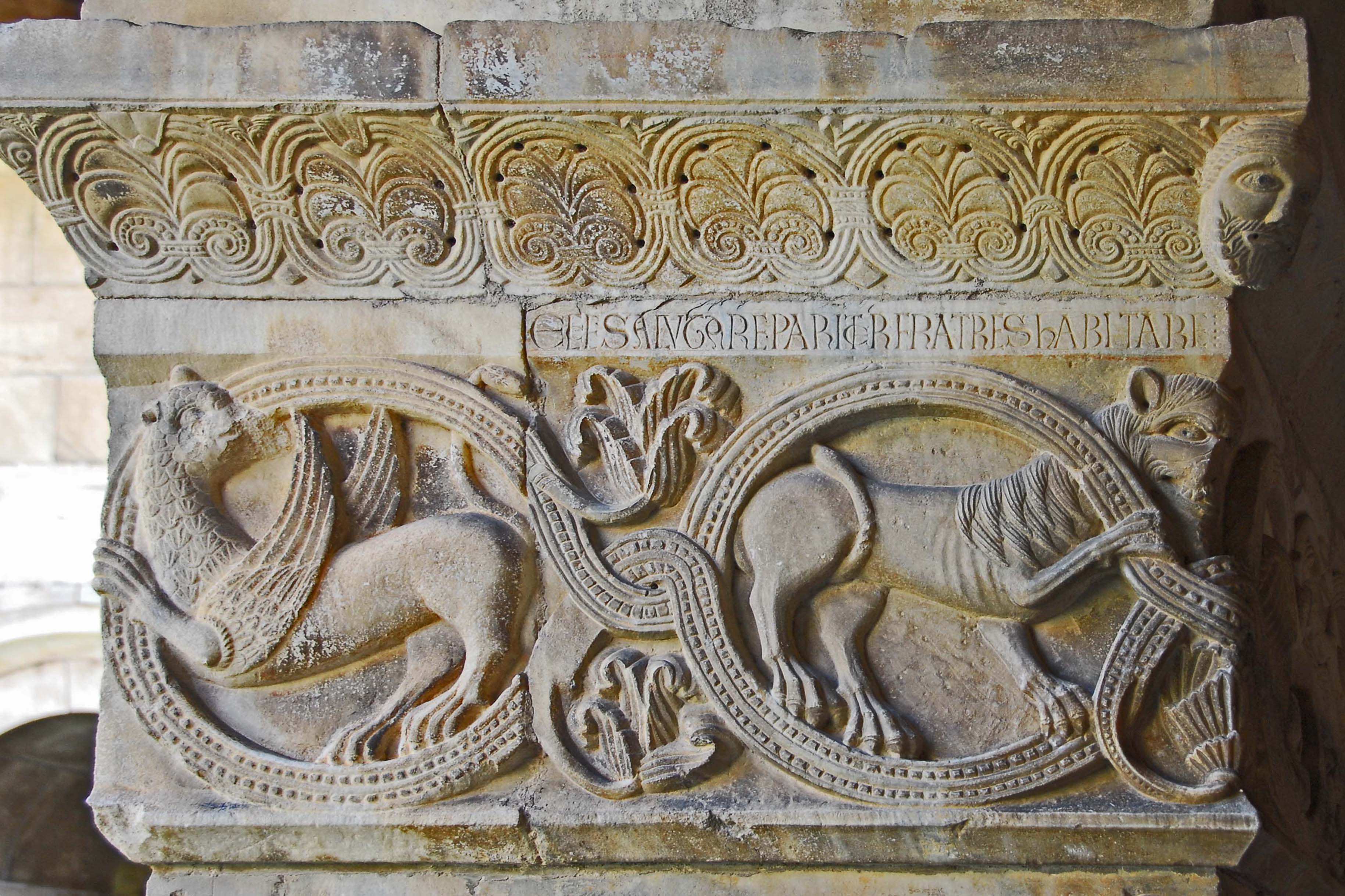 Ste-Eulalie-et-Ste-Julie_d’Elne, Pfeilerkapitell Südgalerie, Greif und Löwe